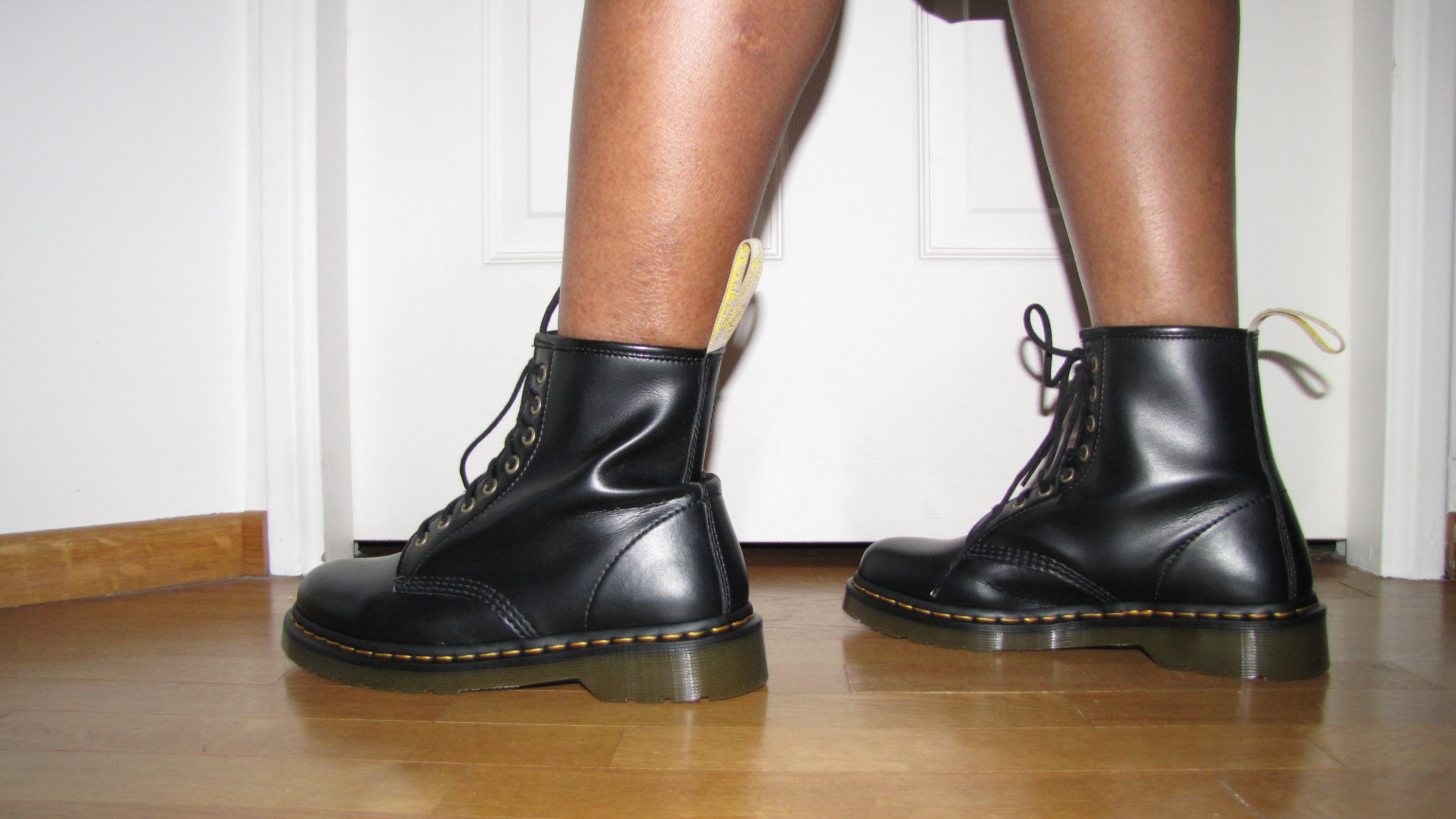 100% Végétal